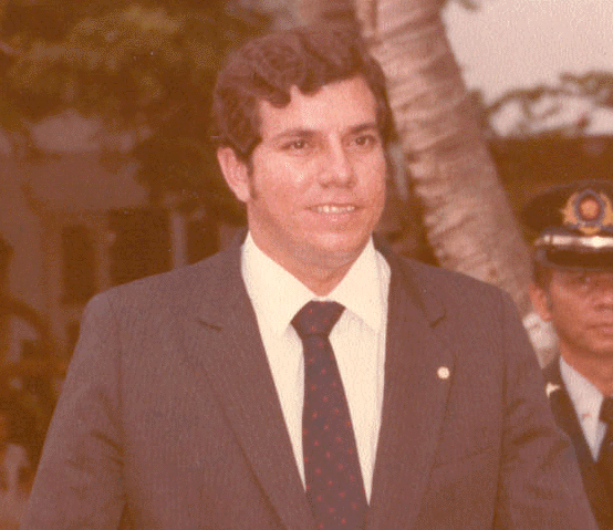 Ex-prefeito de Fortaleza (Brasil) Cesar Cals de Oliveira Neto